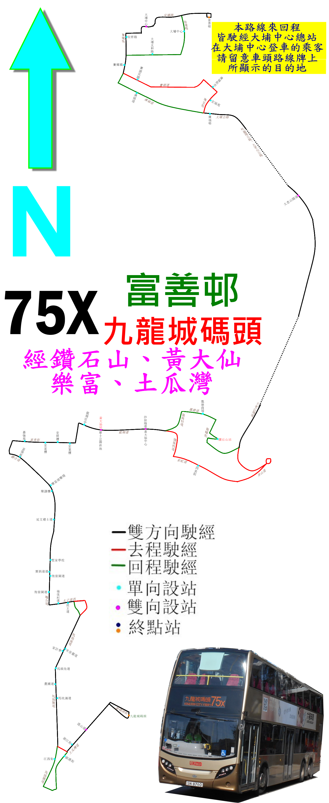 中文（香港）: 九巴75X線的走線圖